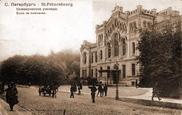 École de commerce en Saint-Pétersbourg